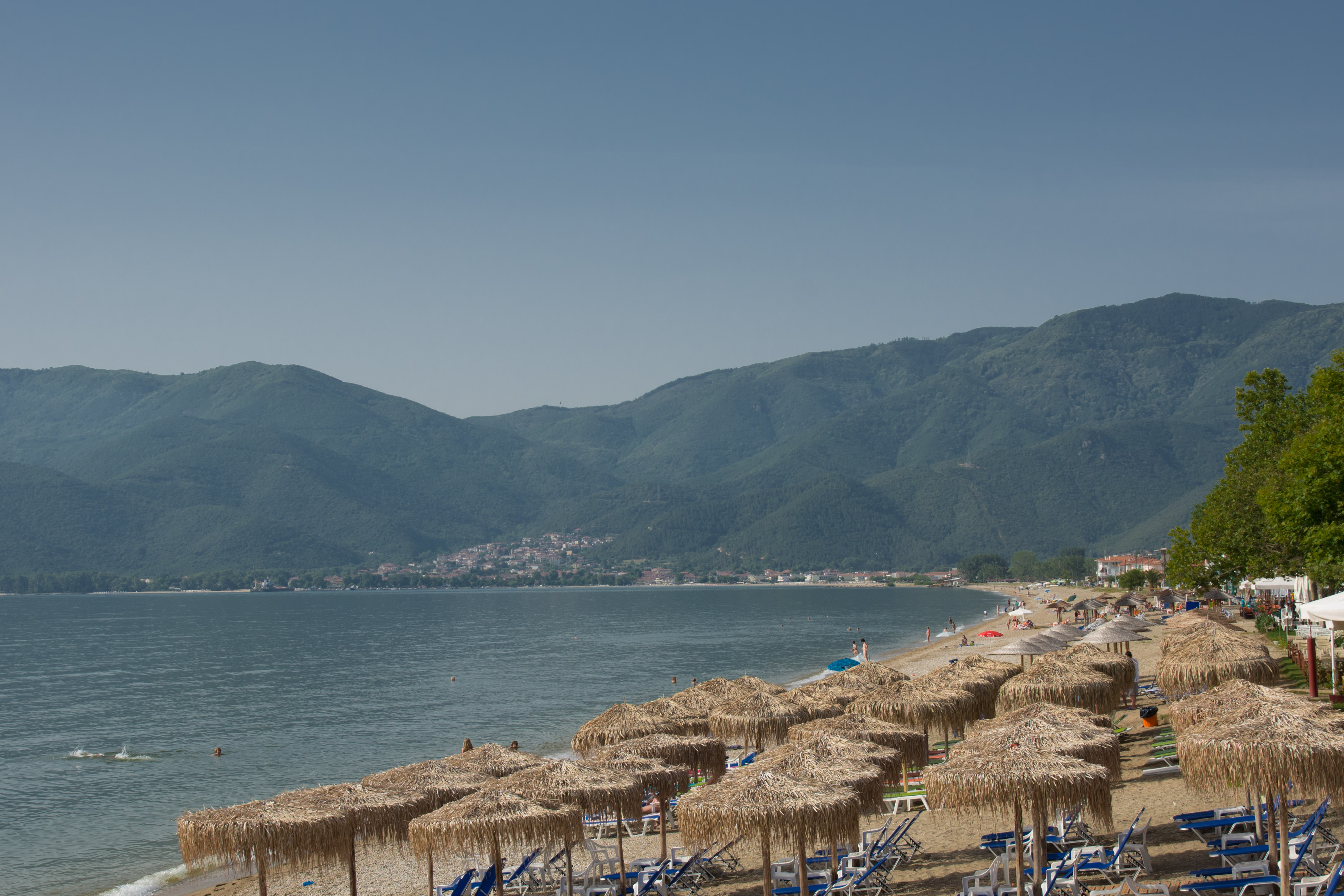 Βρασνά